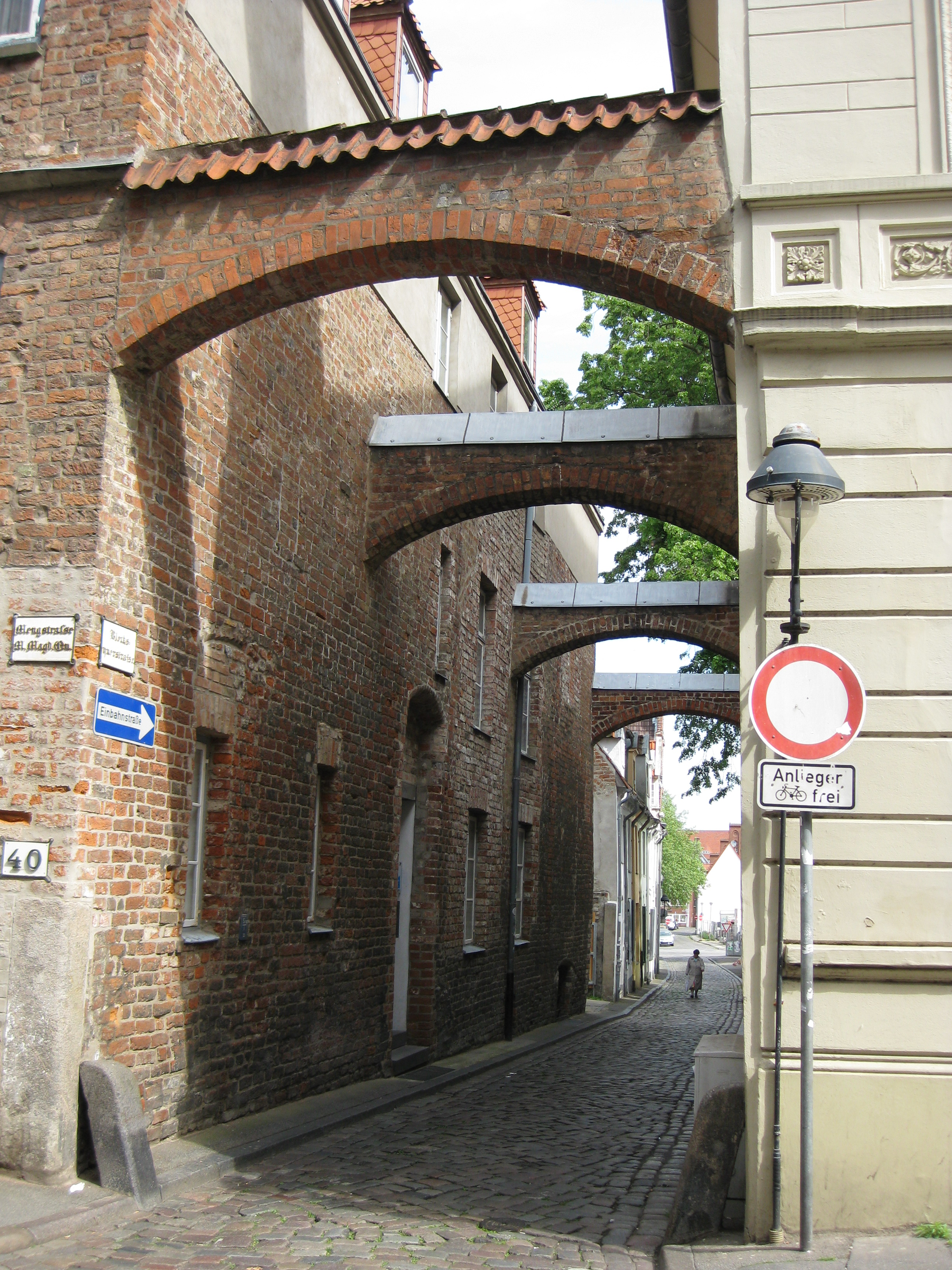 Schwibbögen an der Ecke der Blocksquerstraße zur Mengstraße 40 in Lübeck